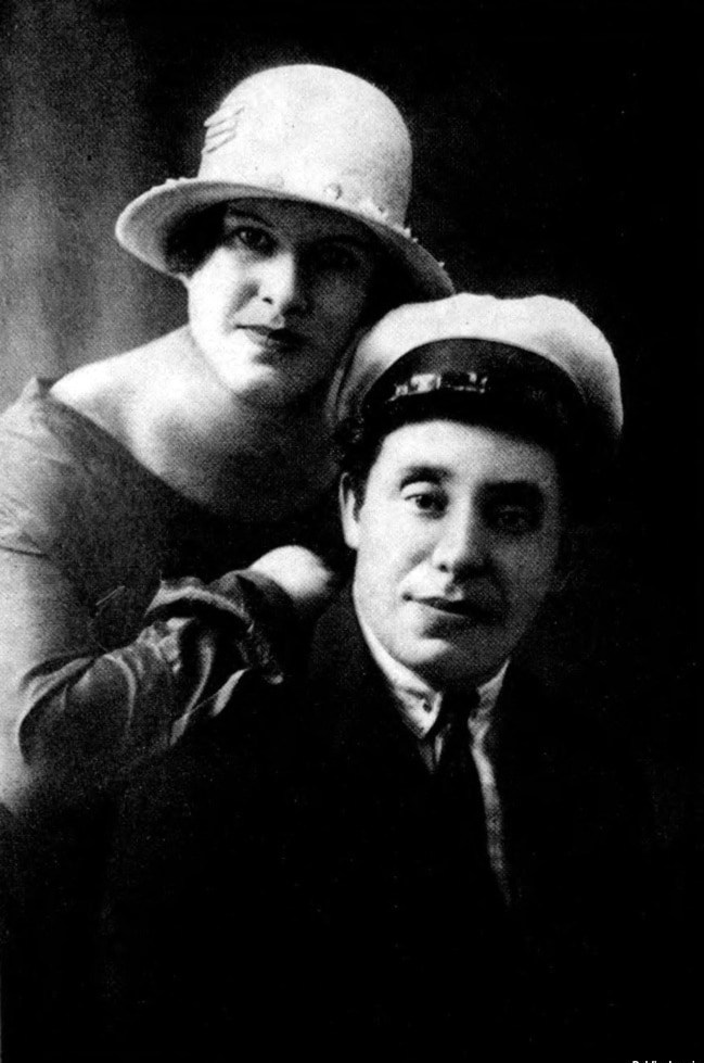 Змітрок Бядуля з жонкай